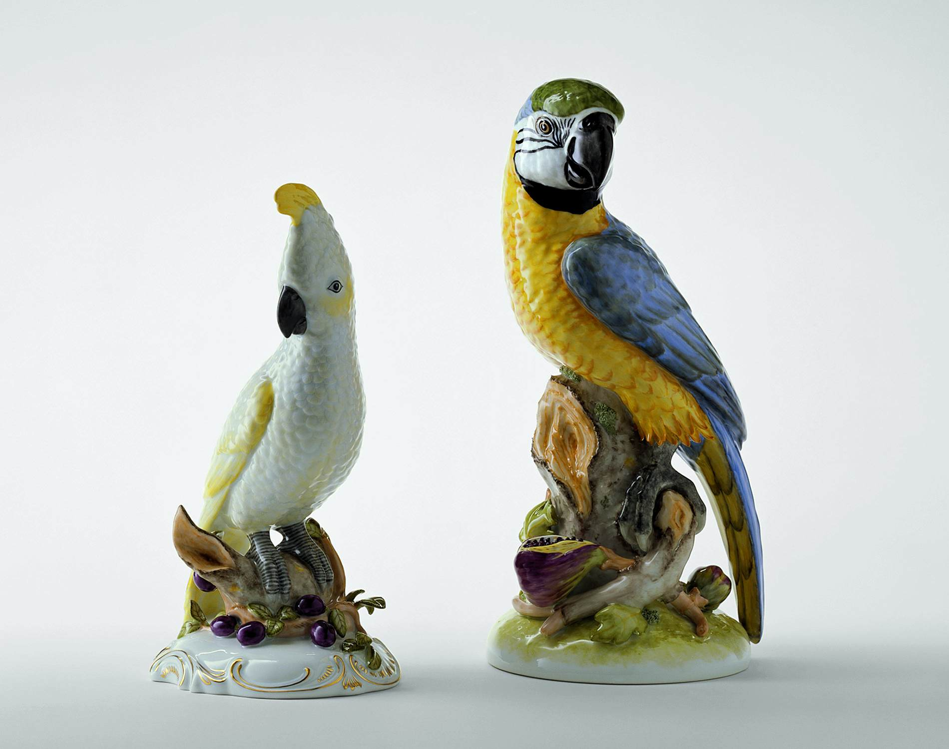 Zwei Porzellanskulpturen